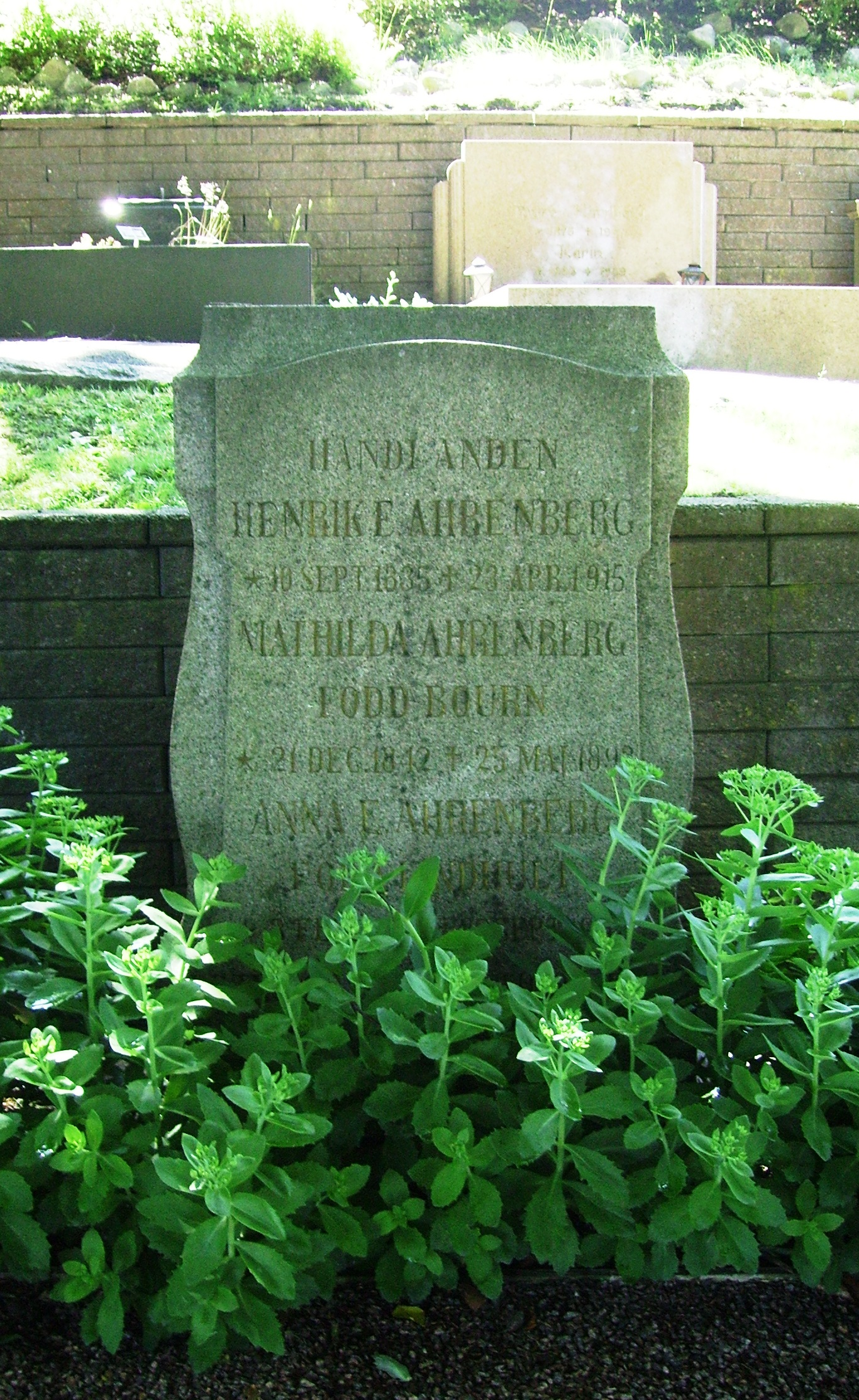 Picture of Henrik Ahrenberg's grave at Östra kyrkogården in Gothenburg.